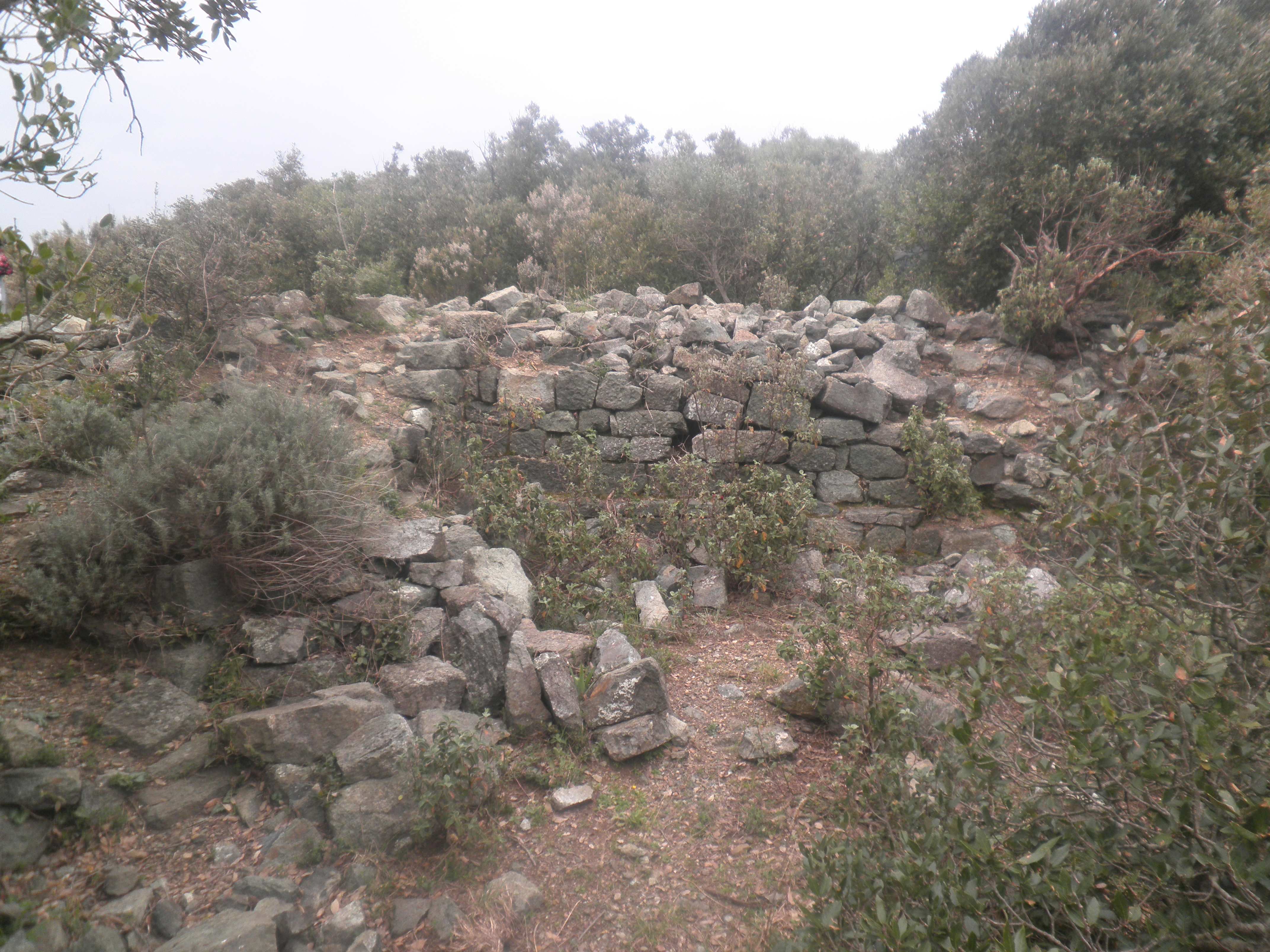 I resti dell'antica città etrusca sul Monte Carvoli.